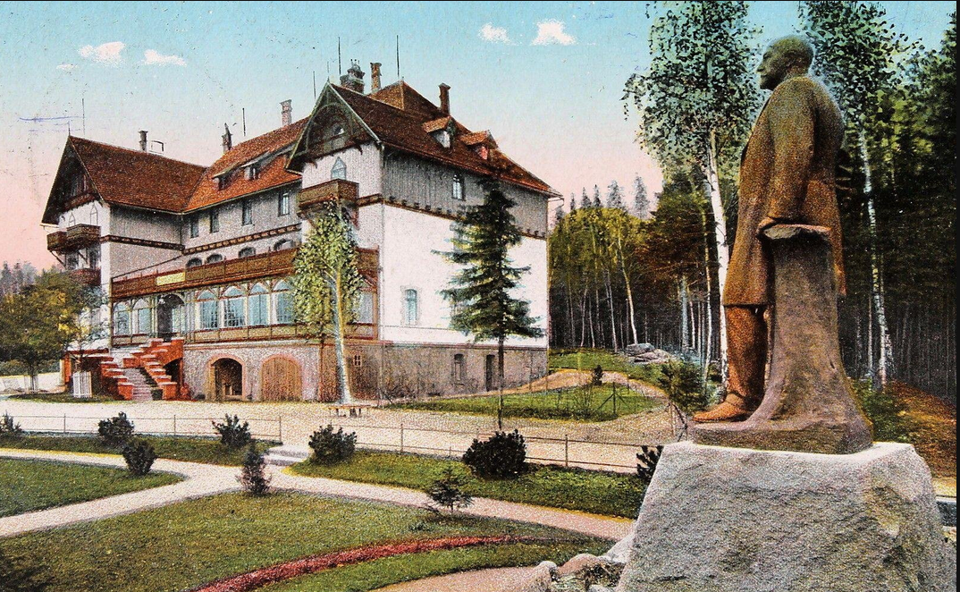 Pocztówka: Robert Bosse - pomnik